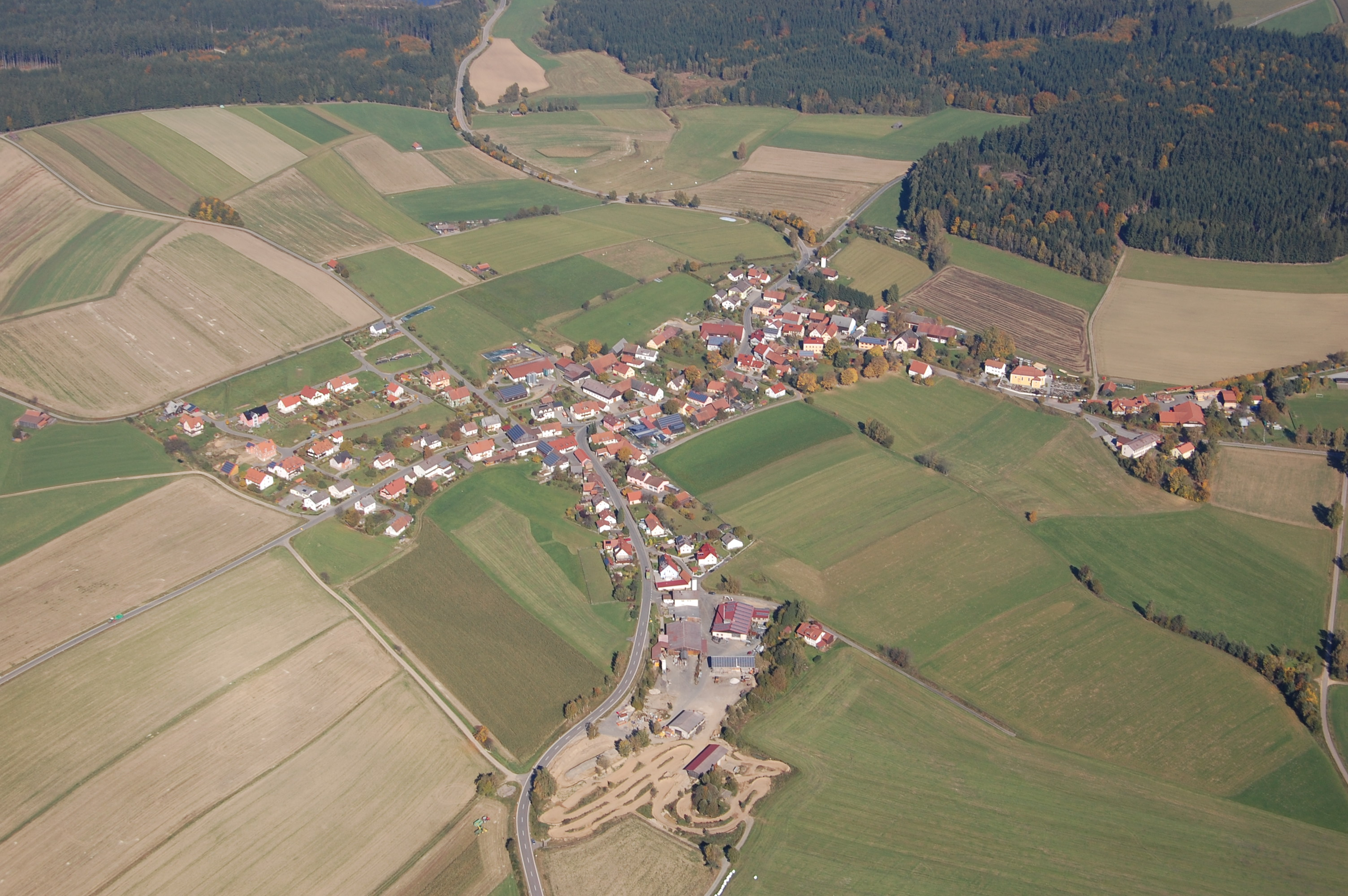 Pullenried, Stadt Oberviechtach, Landkreis Schwandorf, Oberpfalz, Bayern